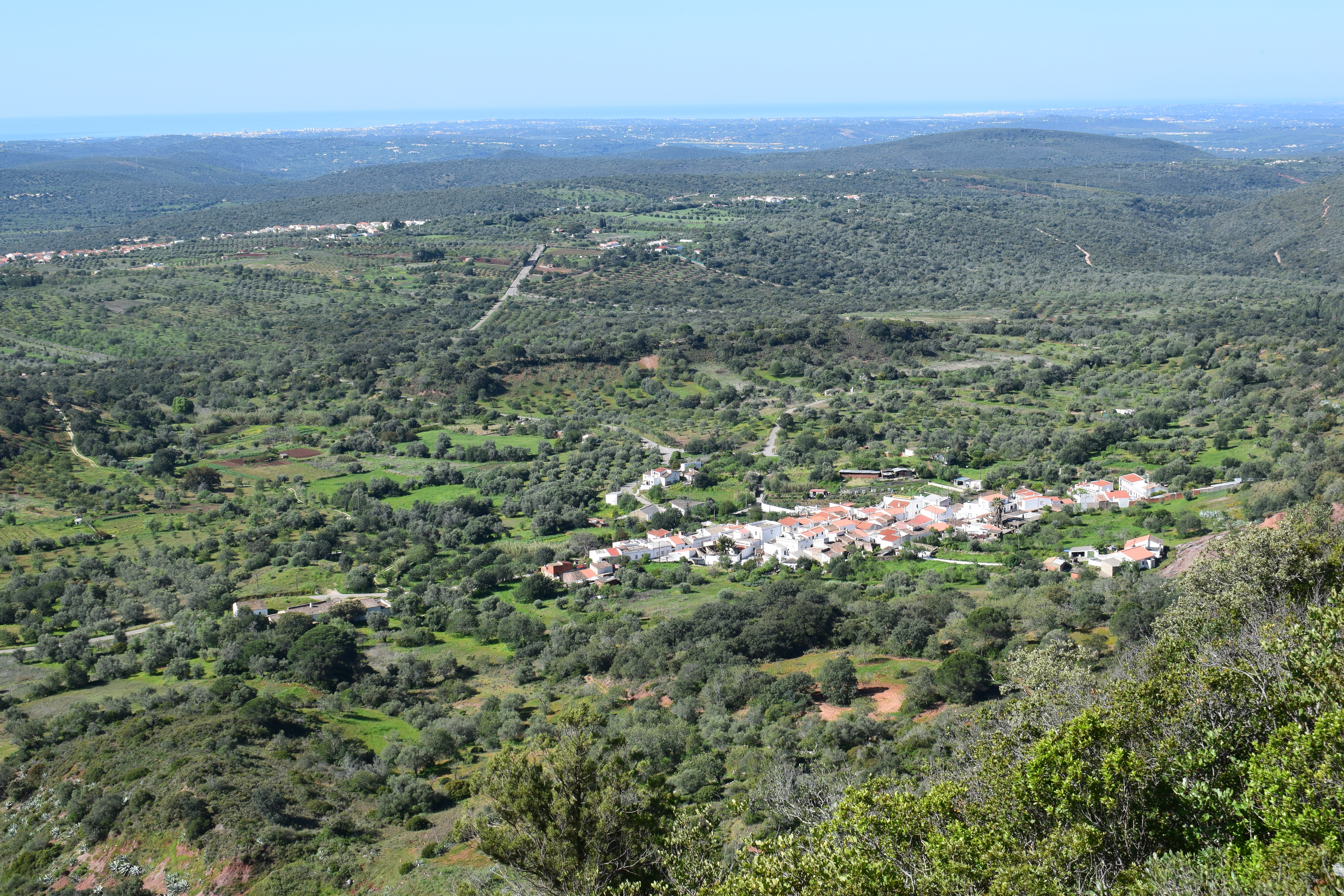 Blick vom Tafelberg Rocha da Pena auf das Dorf Penino, Algarve, Portugal.